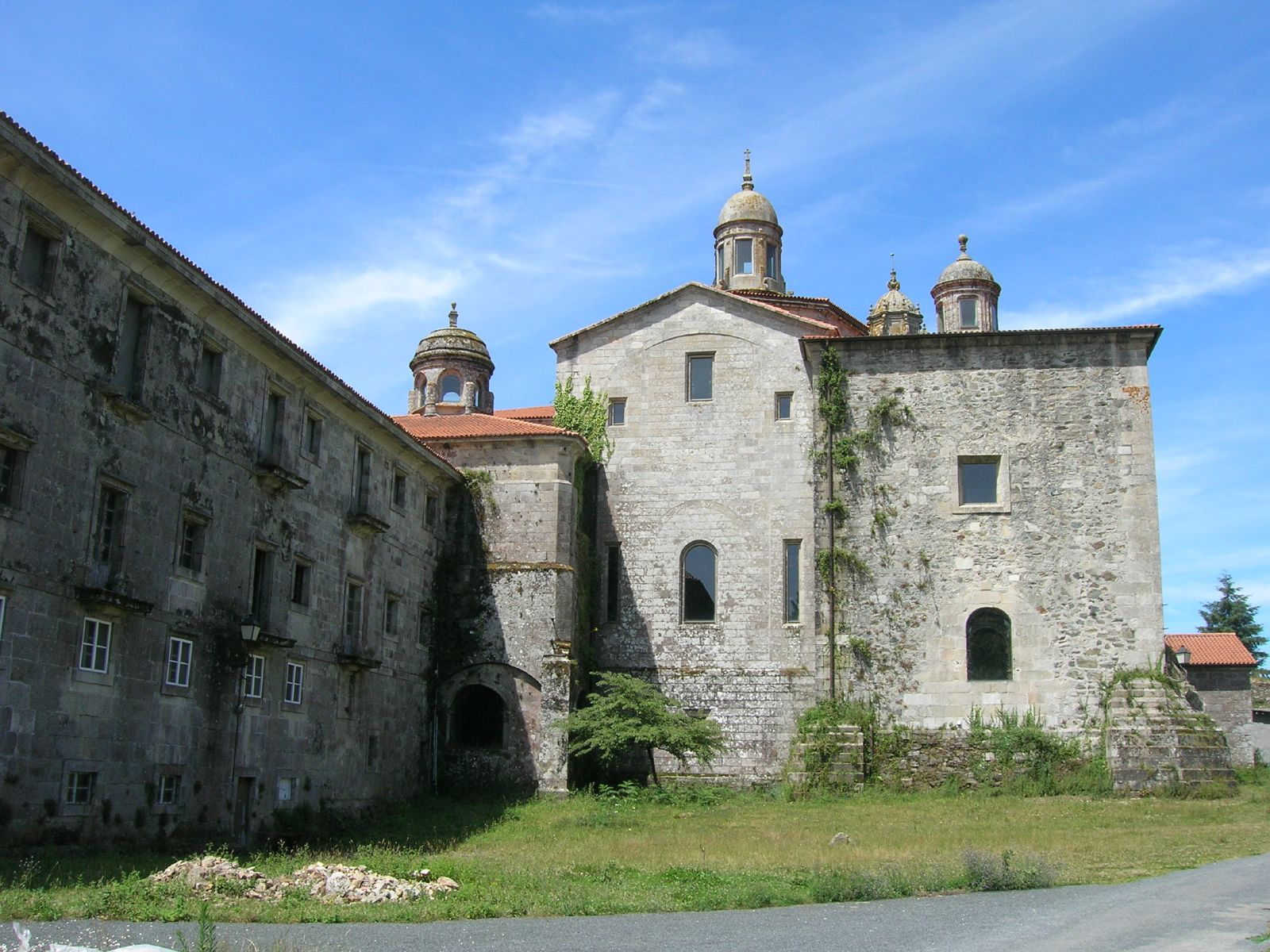 gl_ Testeiro da igrexa do Mosteiro de Santa María de Sobrado dos Monxes - Sobrado Impresionantes y desordenados volúmenes de la poco convencional cabecera de la iglesia, en la que destaca la Capilla del Rosario a nuestra derecha.Monasterio de Santa María de Sobrado dos Monxes